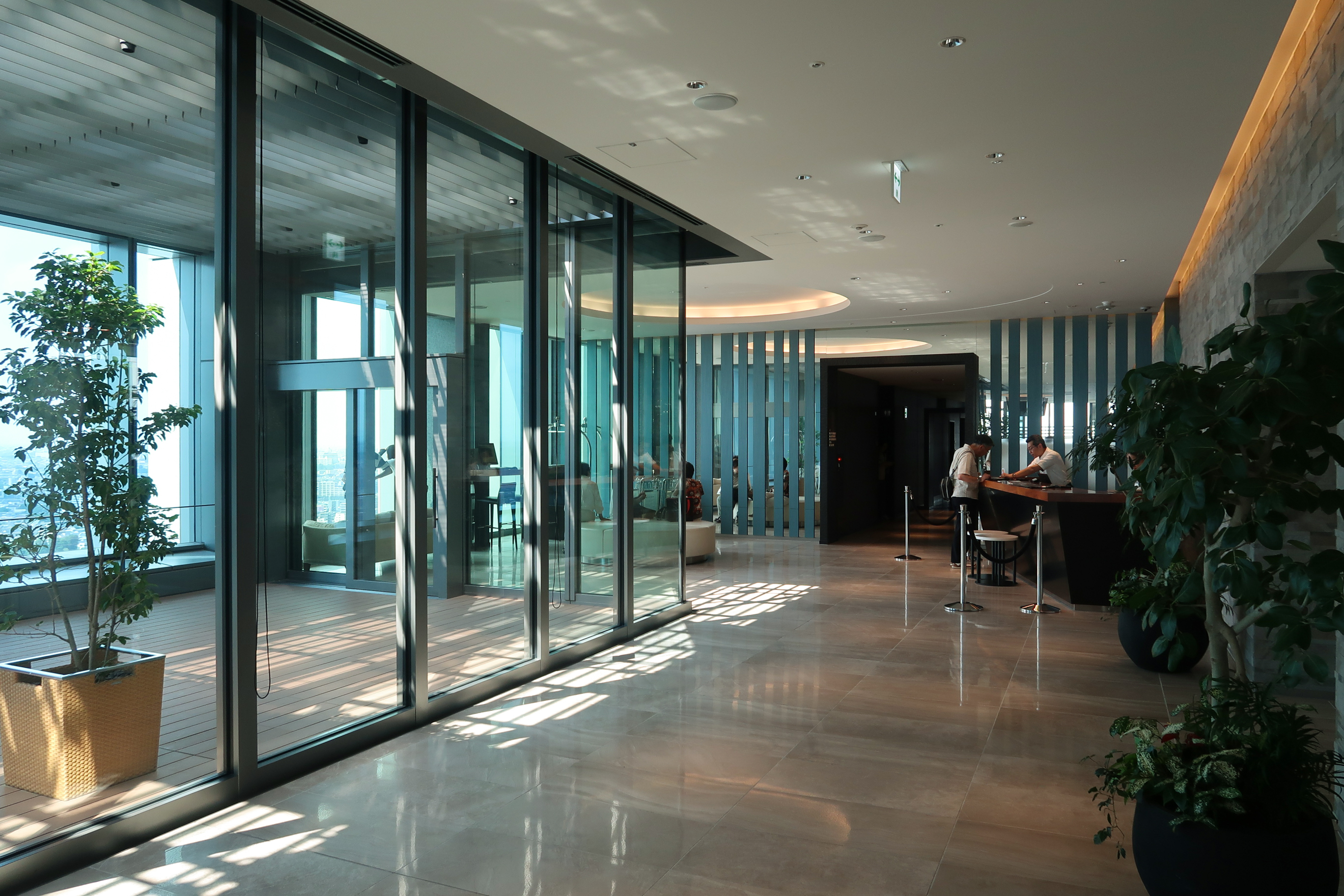 Futakotamagawa Excel Hotel Tokyu 30F lobby